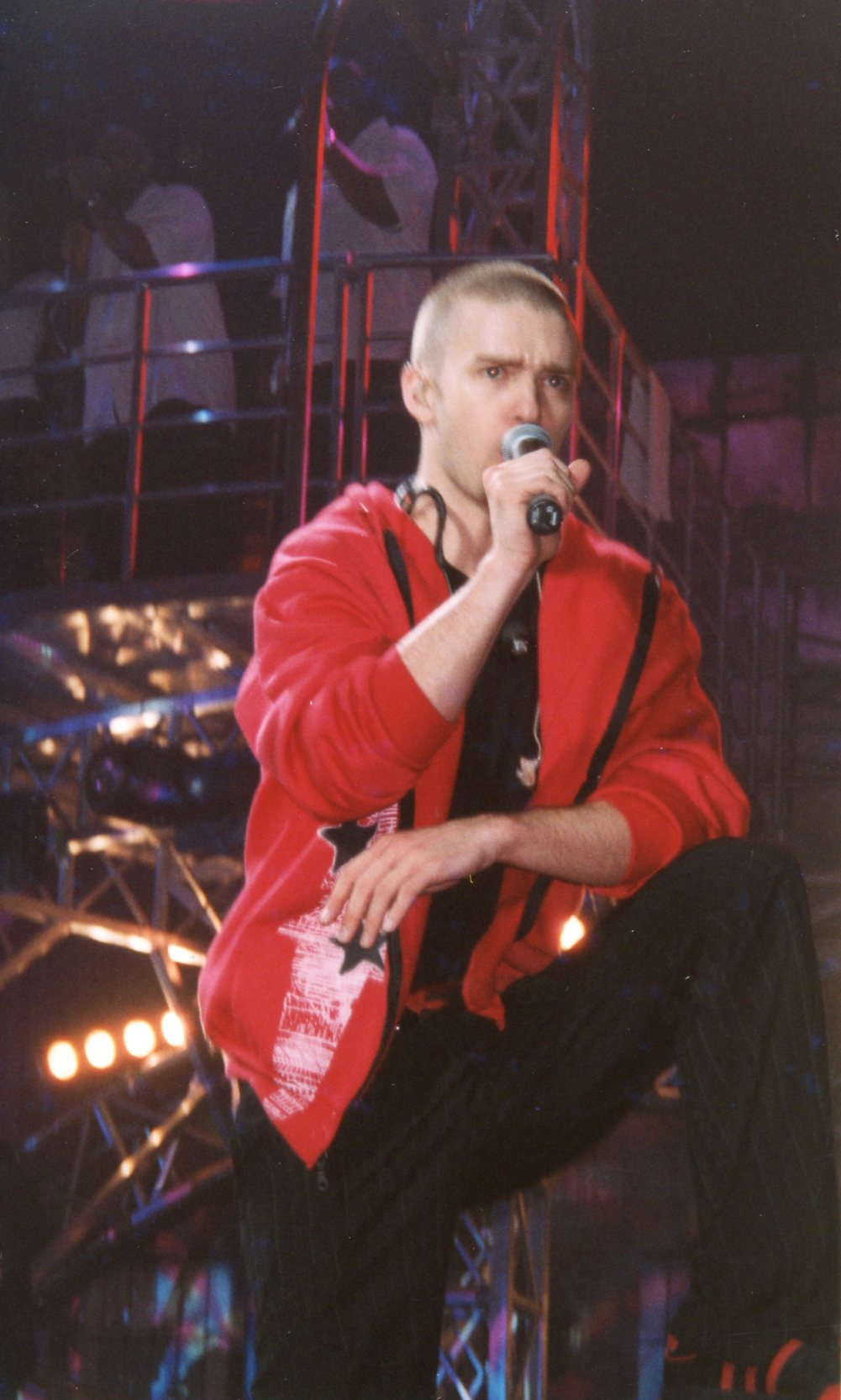 El cantante estadounidense Justin Timberlake dando un show en el Earls Court Exhibition Centre de Londres, Inglaterra, con motivo de su gira musical Justified World Tour en 2003-2004.